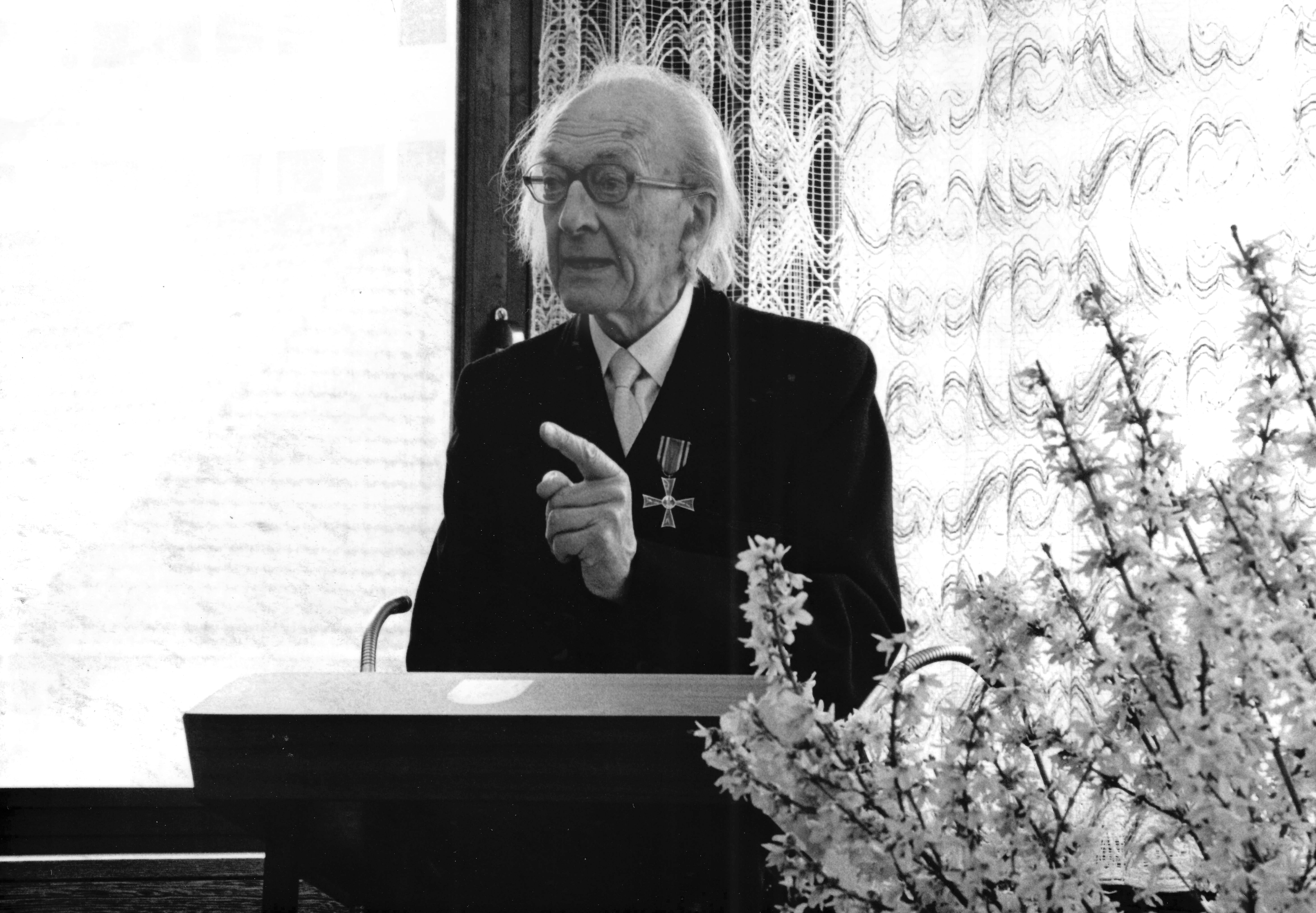 Verleihung des Bundesverdienstkreuzes am Bande in Offenbach am 19. März 1981